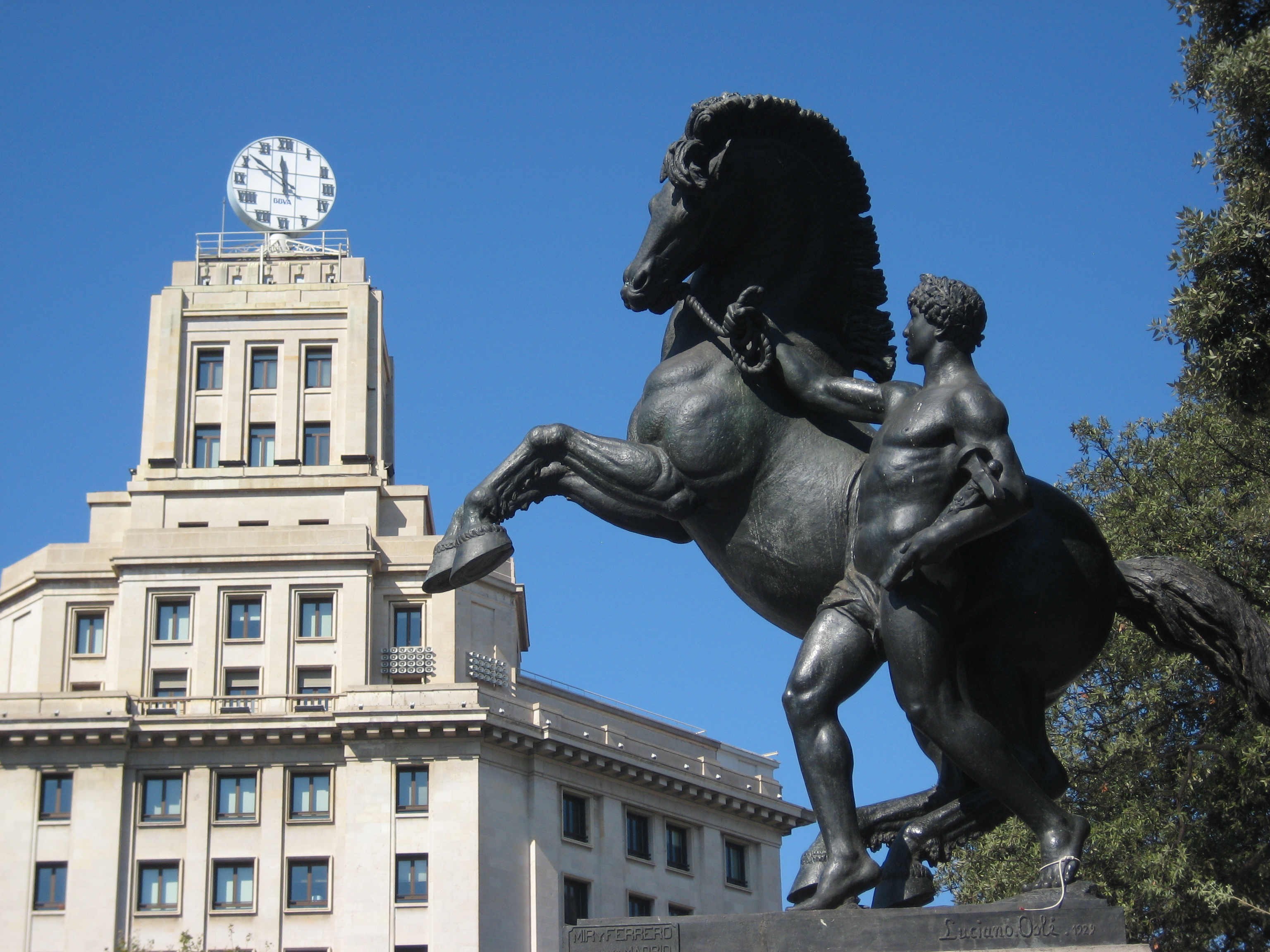 Конная статуя на площади Каталонии, Барселона